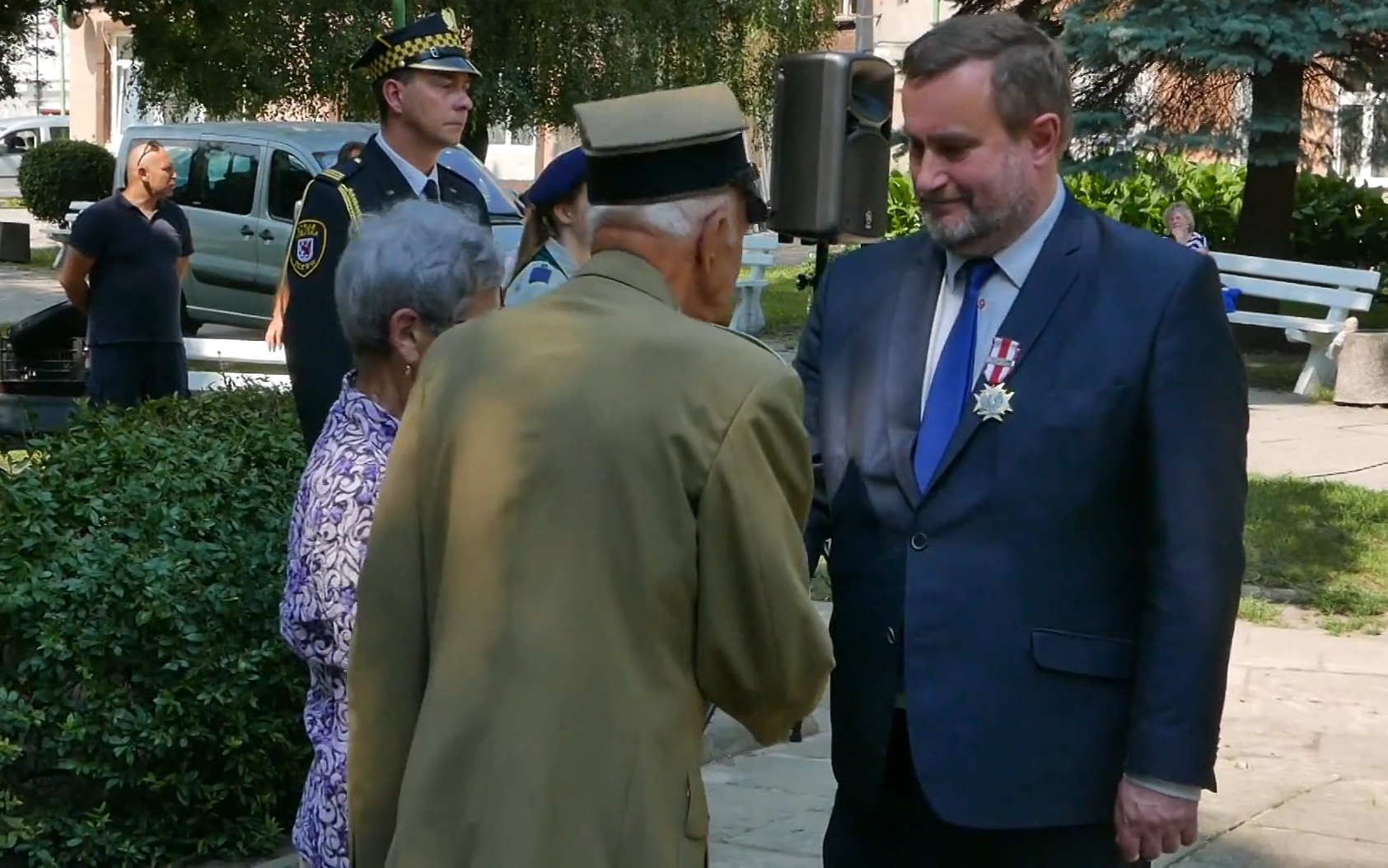 Mirosław Pobłocki, Tczew, 1 sierpnia 2018